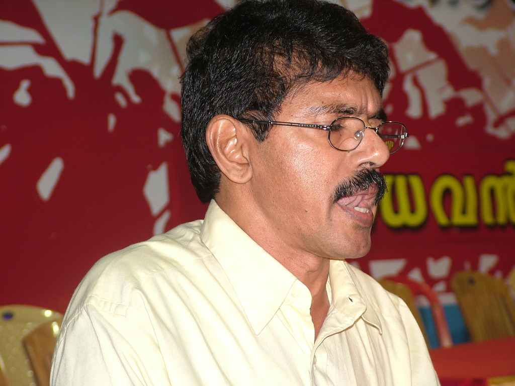 ബാലചന്ദ്രന്‍ ചുള്ളിക്കാട് കൊല്ലത്തെ ഒരു കാവ്യസന്ധ്യയില്‍